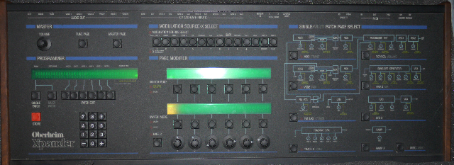 Oberheim Xpander analog synthesizer